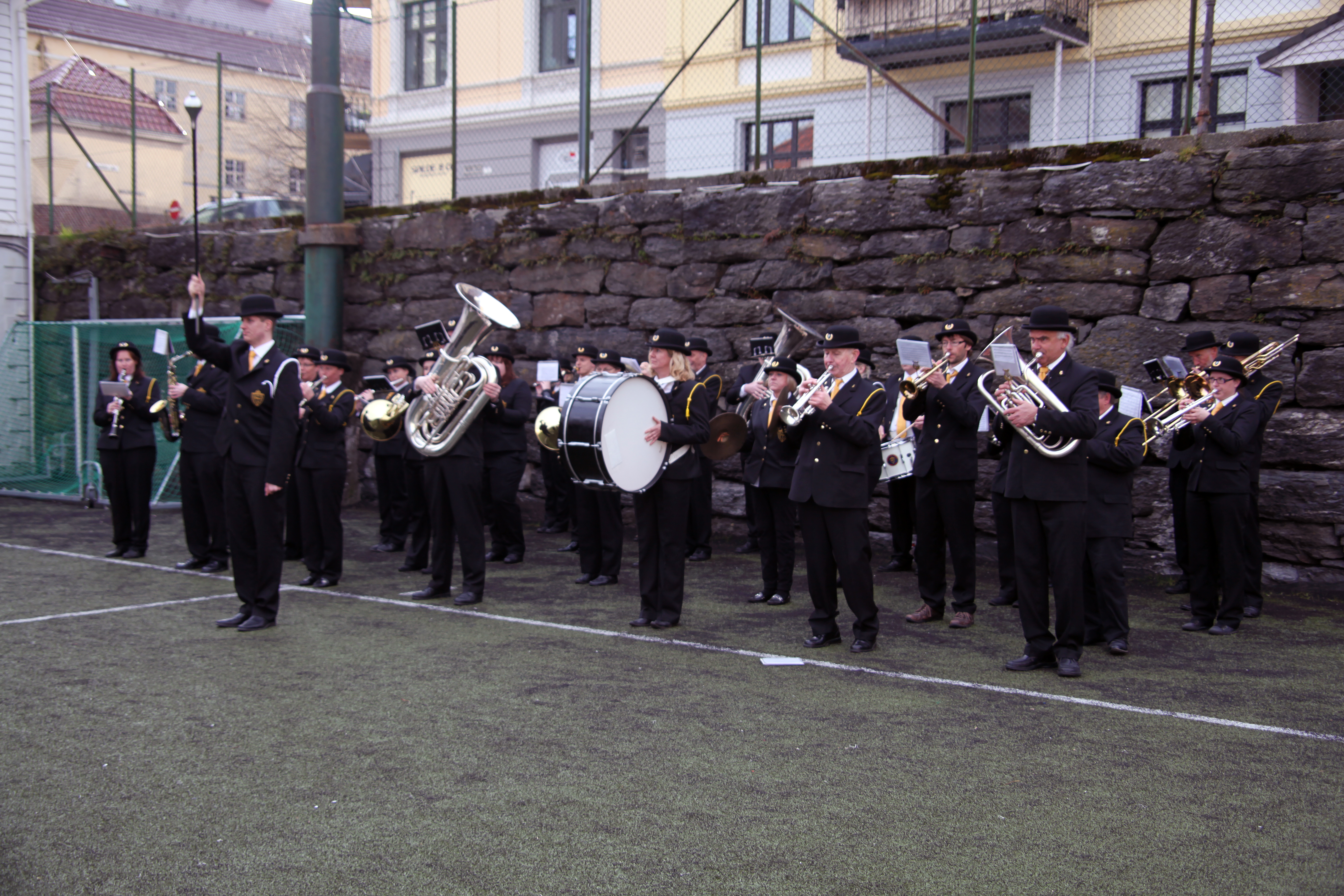 Lungegaardens Musikkorps